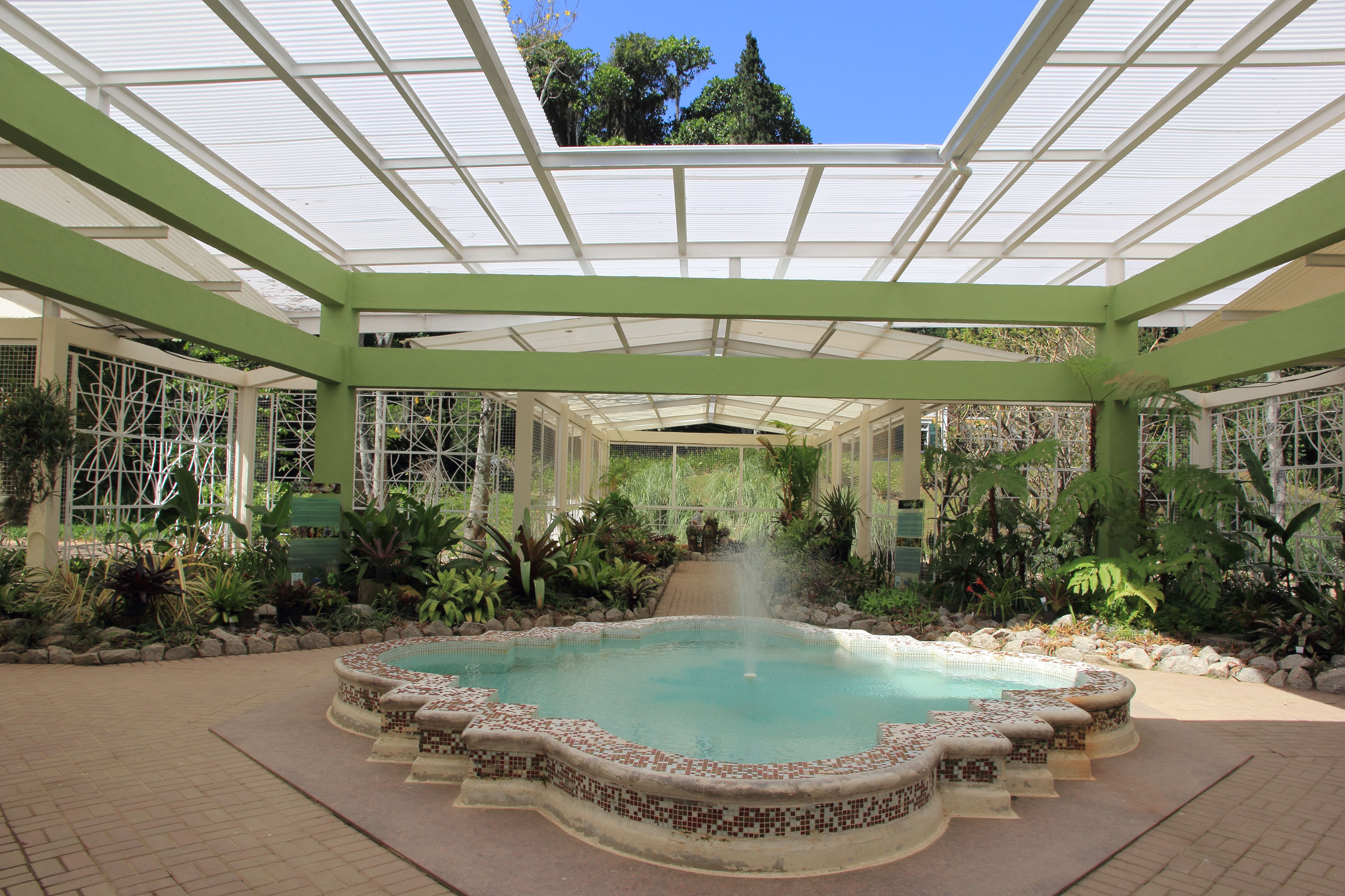 Bromeliário do Jardim Botânico do Rio de Janeiro